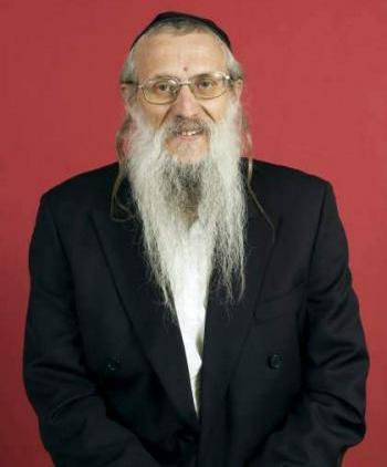 he:אסיר ציון הרב he:יוסף מנדלביץ'